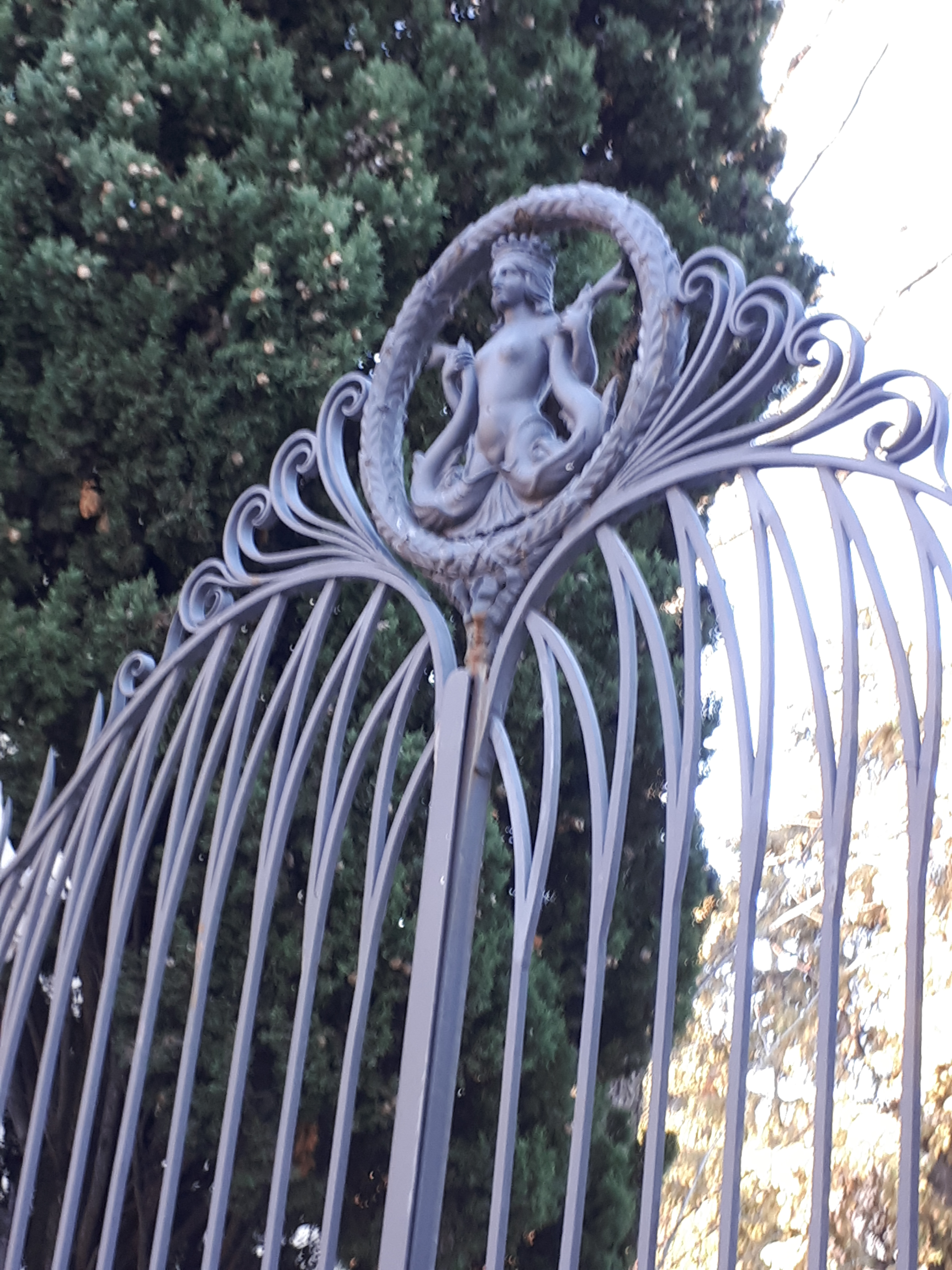 Particolare della cancellata di palazzo da Schio a Schio